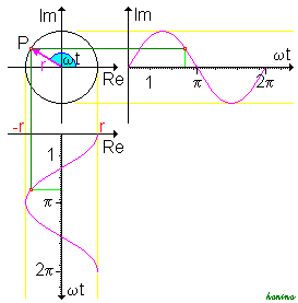 Schwingungen als Projektion eines rotierenden Zeigers